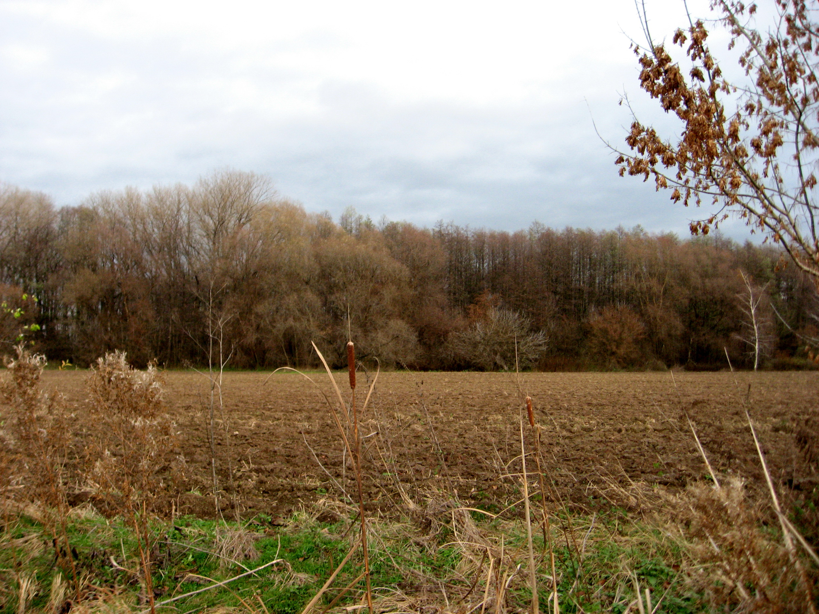 Černovický hájek